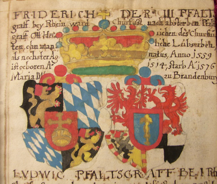 Um Zusätze vermehrte Abschrift von Sigmund Feyerabends Frankfurter Ausgabe (1578/1579) des Turnierbuchs von Georg Rüxner (Jörg Rugen), Handschrift auf Papier, 17. Jahrhundert. Detail